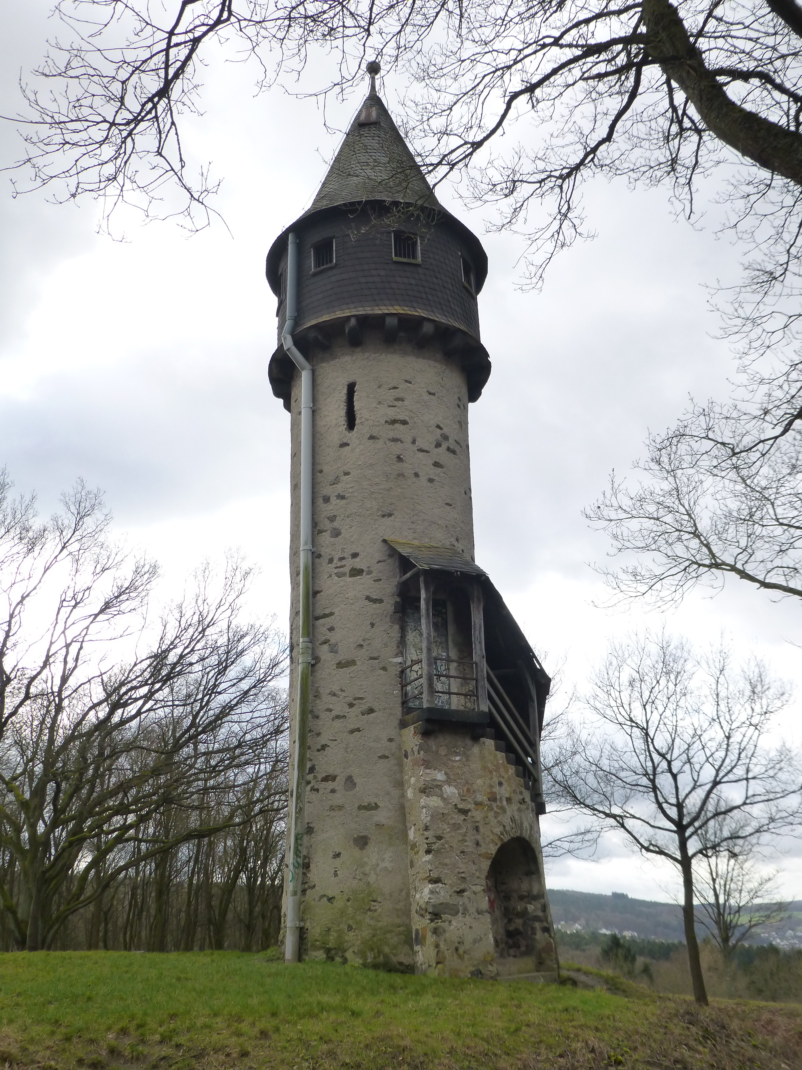 Brühlsbacher Warte in Wetzlar